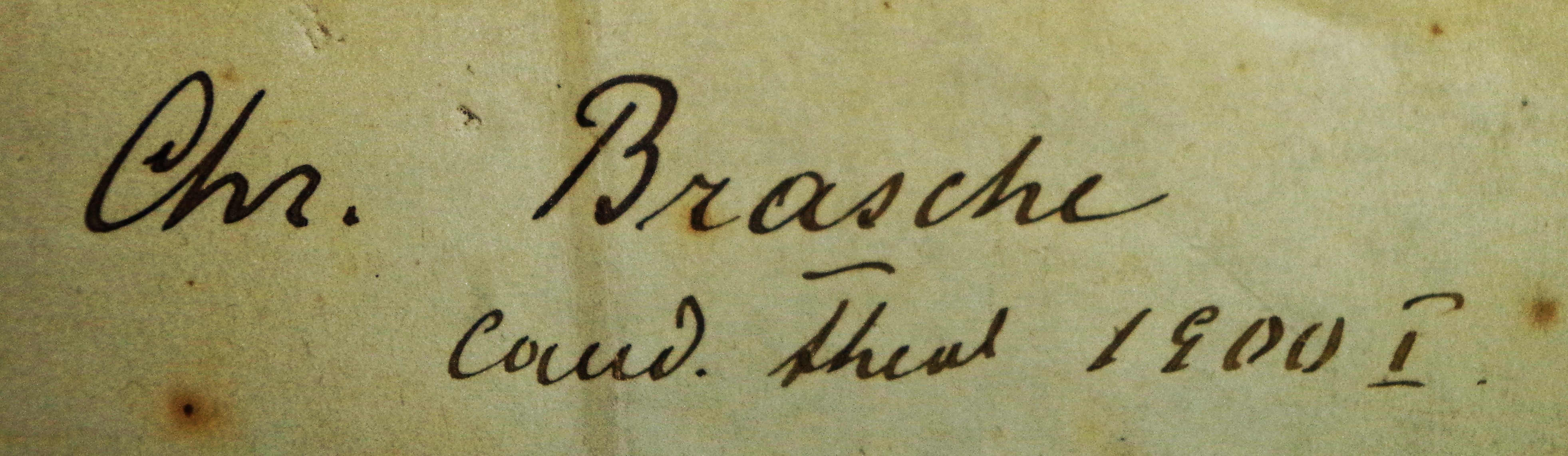 Christfried Brasche (10.06.1875 – 18.04.1949) autograaf.